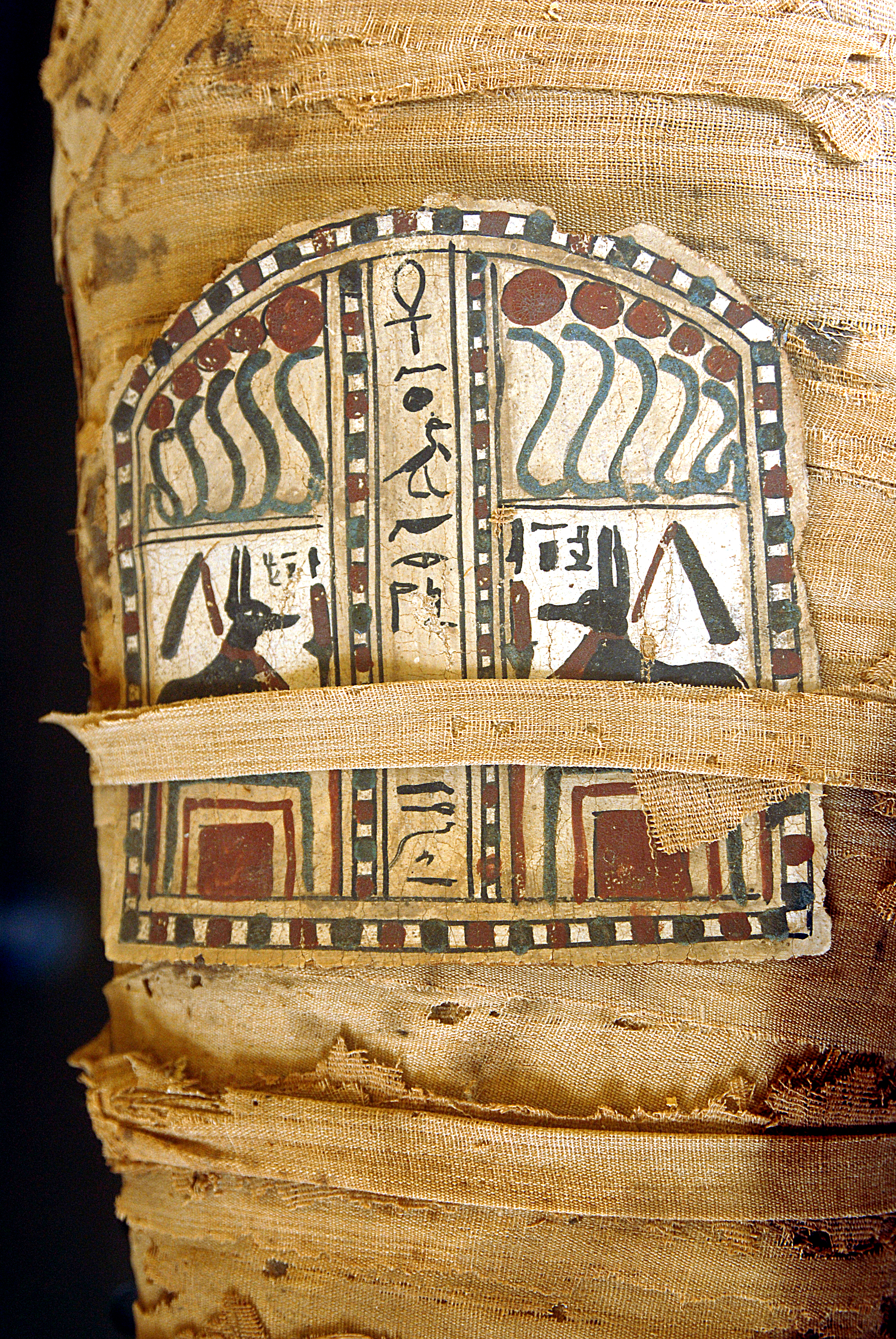 Plantilla inferior de la mòmia. Inscripció que diu: "Viva és la teva ànima, oh Osiris Nesi, justa de veu eternament".